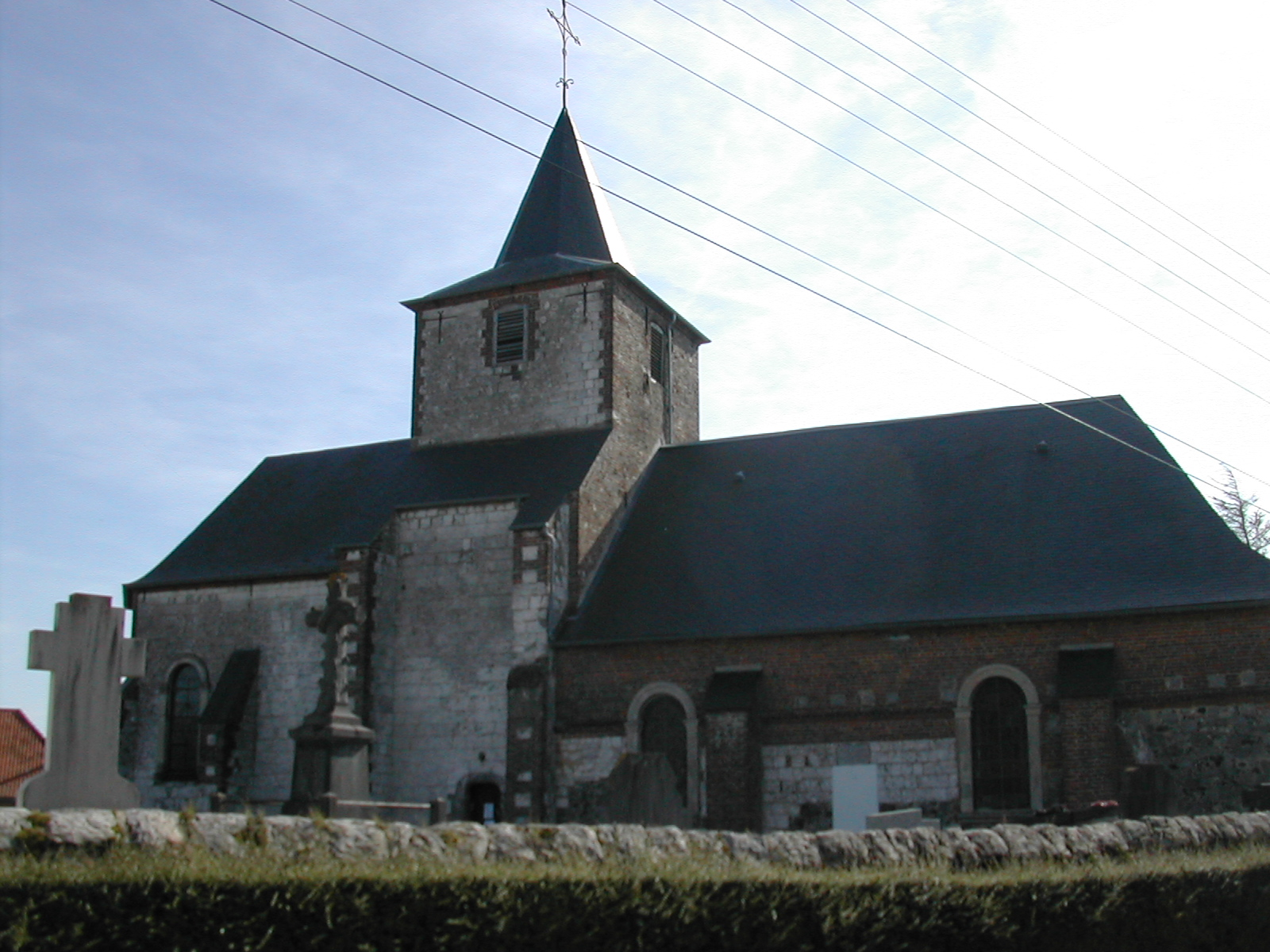 L'église de Lacres.